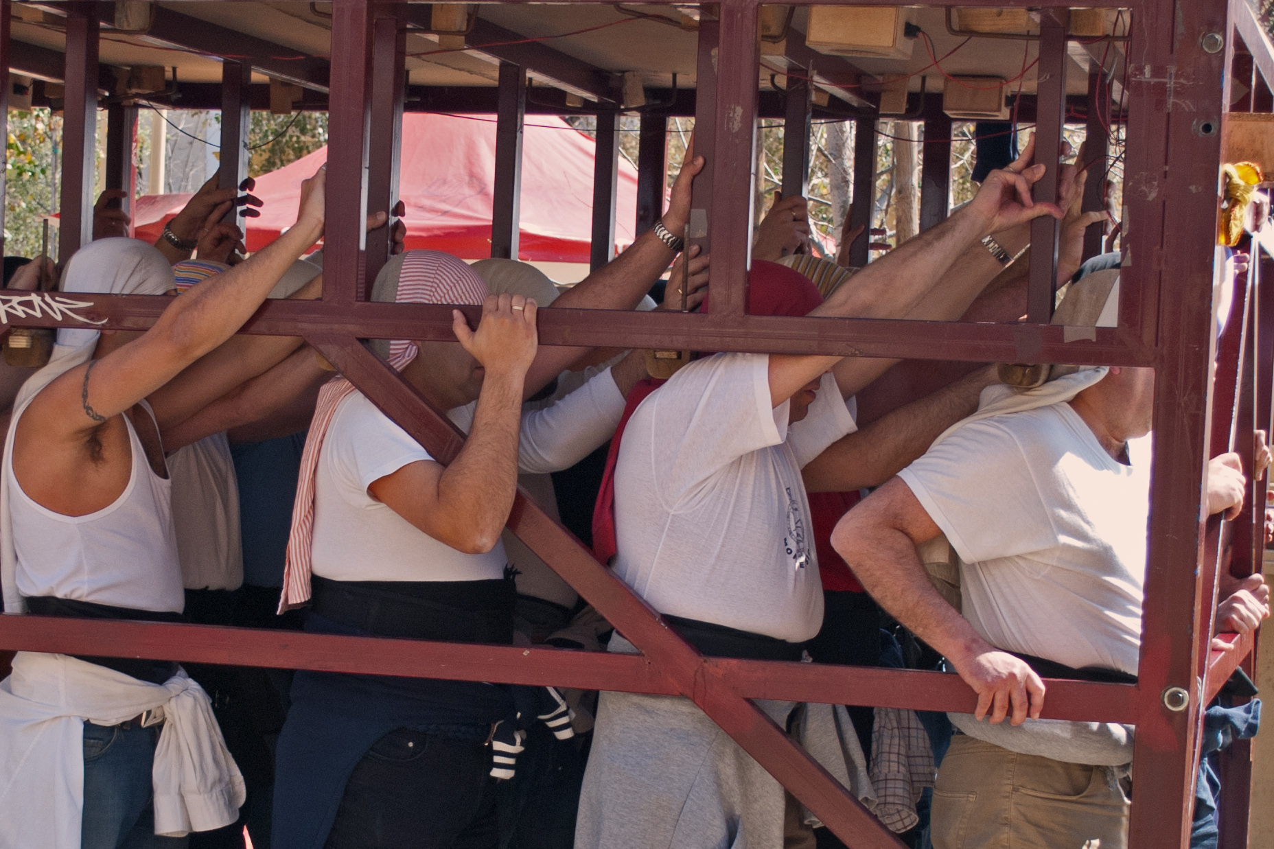 Ensayo de costaleros en la Alameda de Hércules, Sevilla.